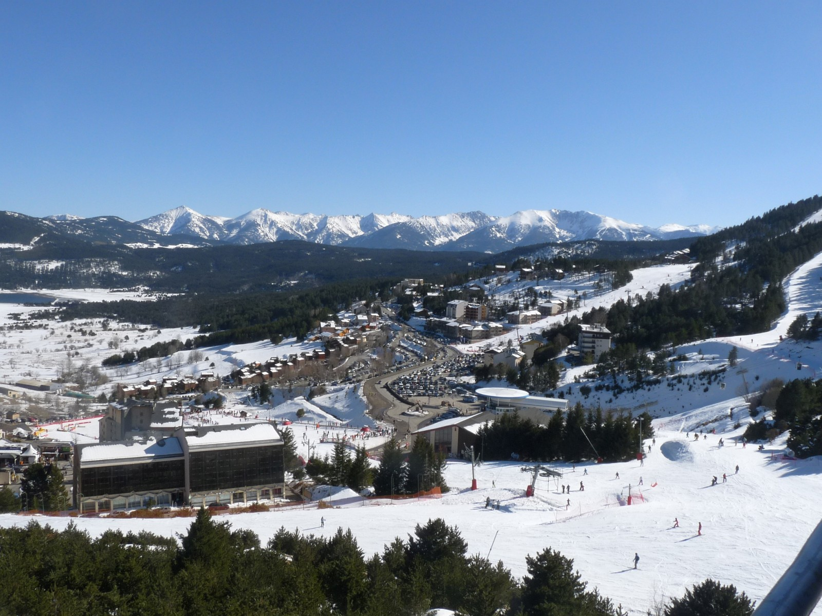 Station des Angles, pied du télécabine, Pyrénées-Orientales, France.